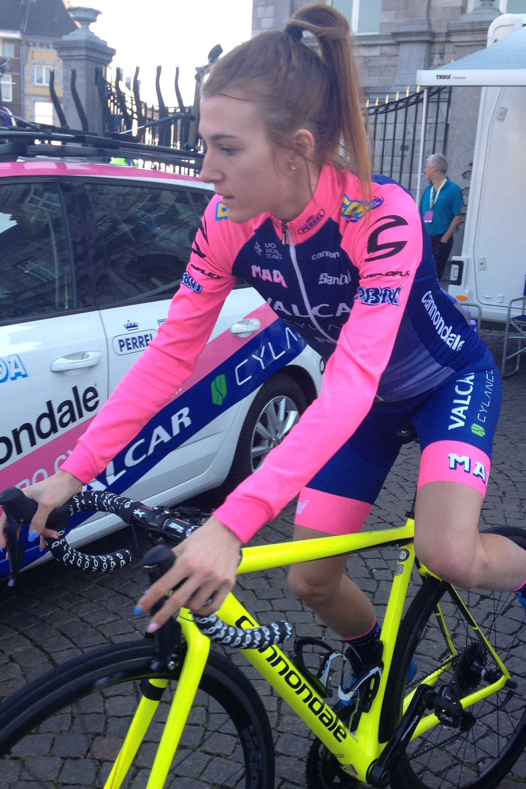 Start van de Amstel Gold Race Ladies Edition 2019 in Maastricht